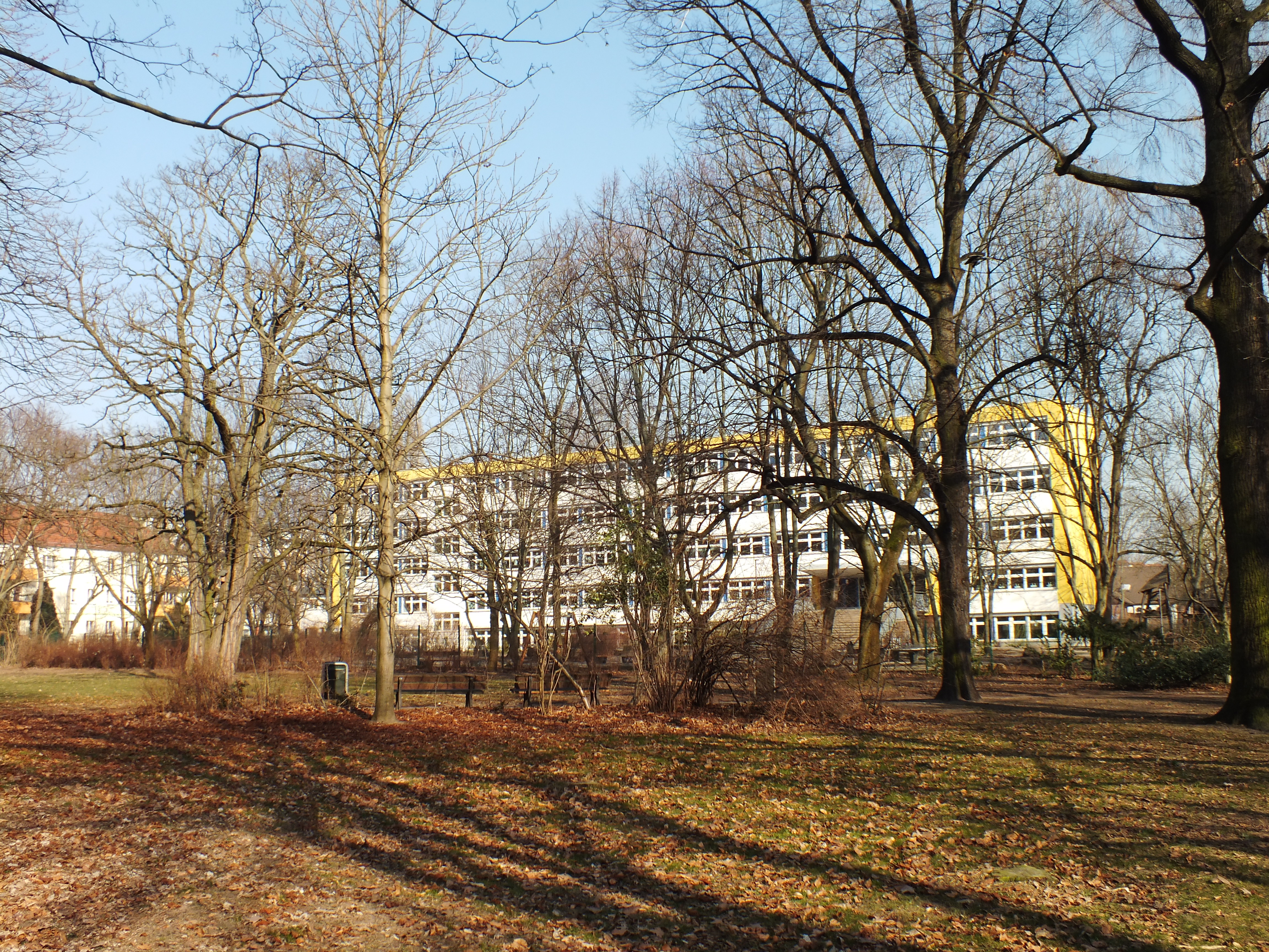 Gutspark Lichtenberg, Bezirk Lichtenberg von Berlin: Grundschule im Gutspark